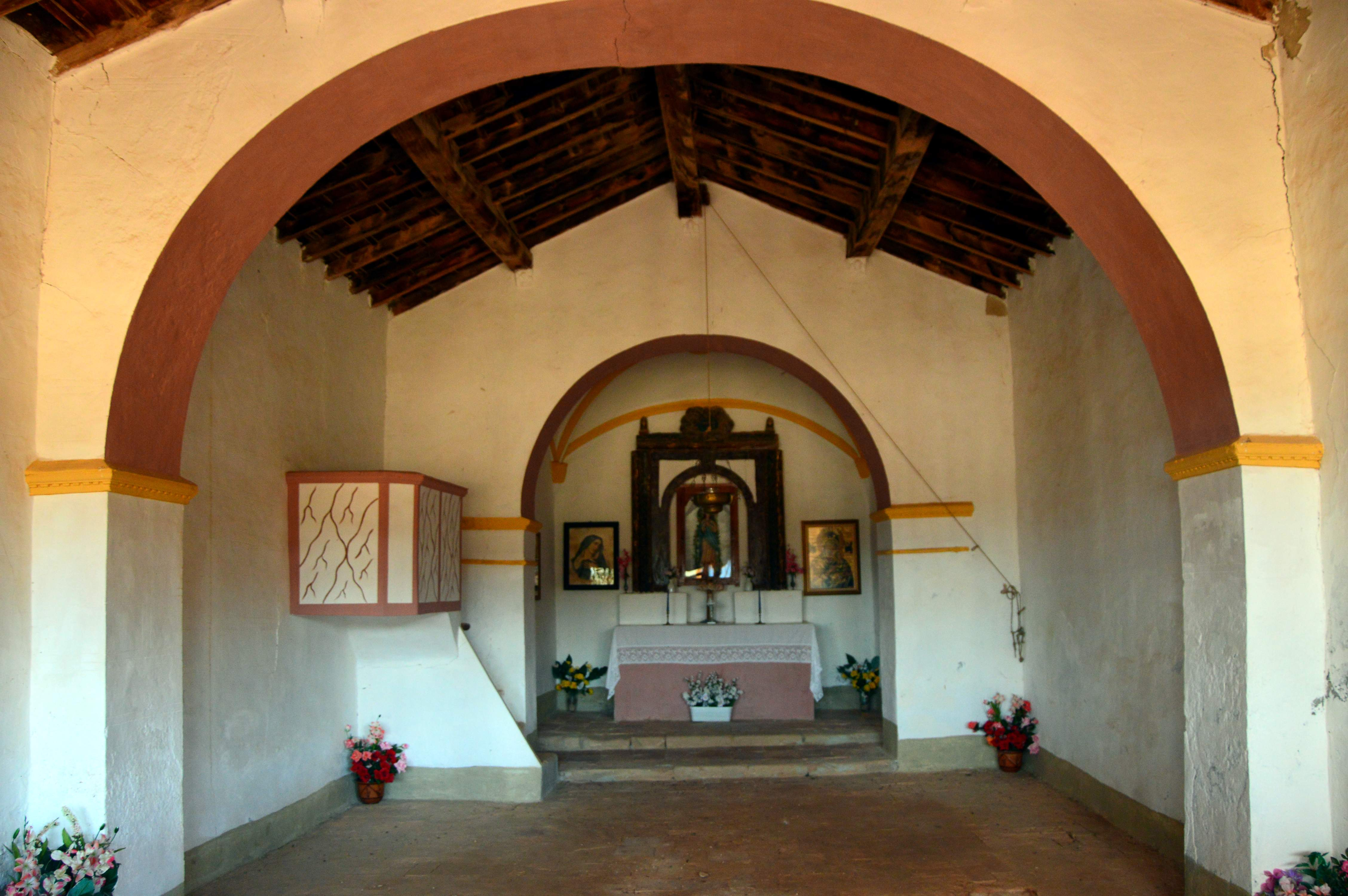 Nave de la Ermita de la Purísima en Puebla de San Miguel (Valencia), con el presbiterio al fondo (2018).